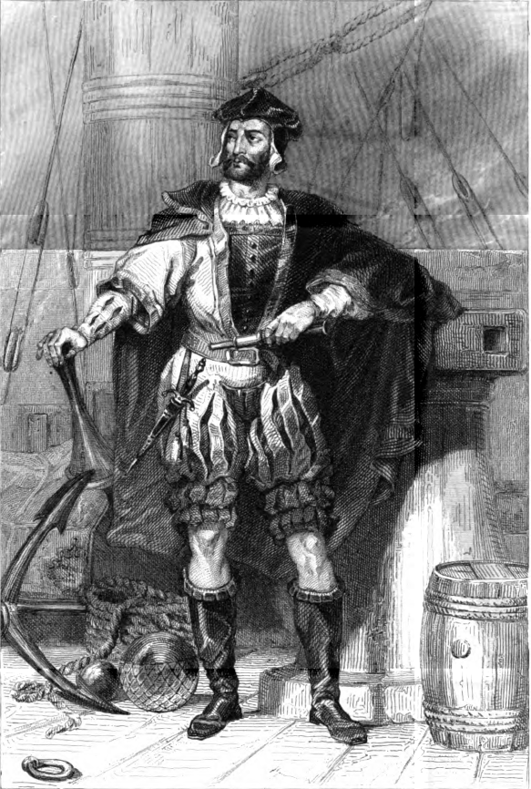 Jacques Cartier